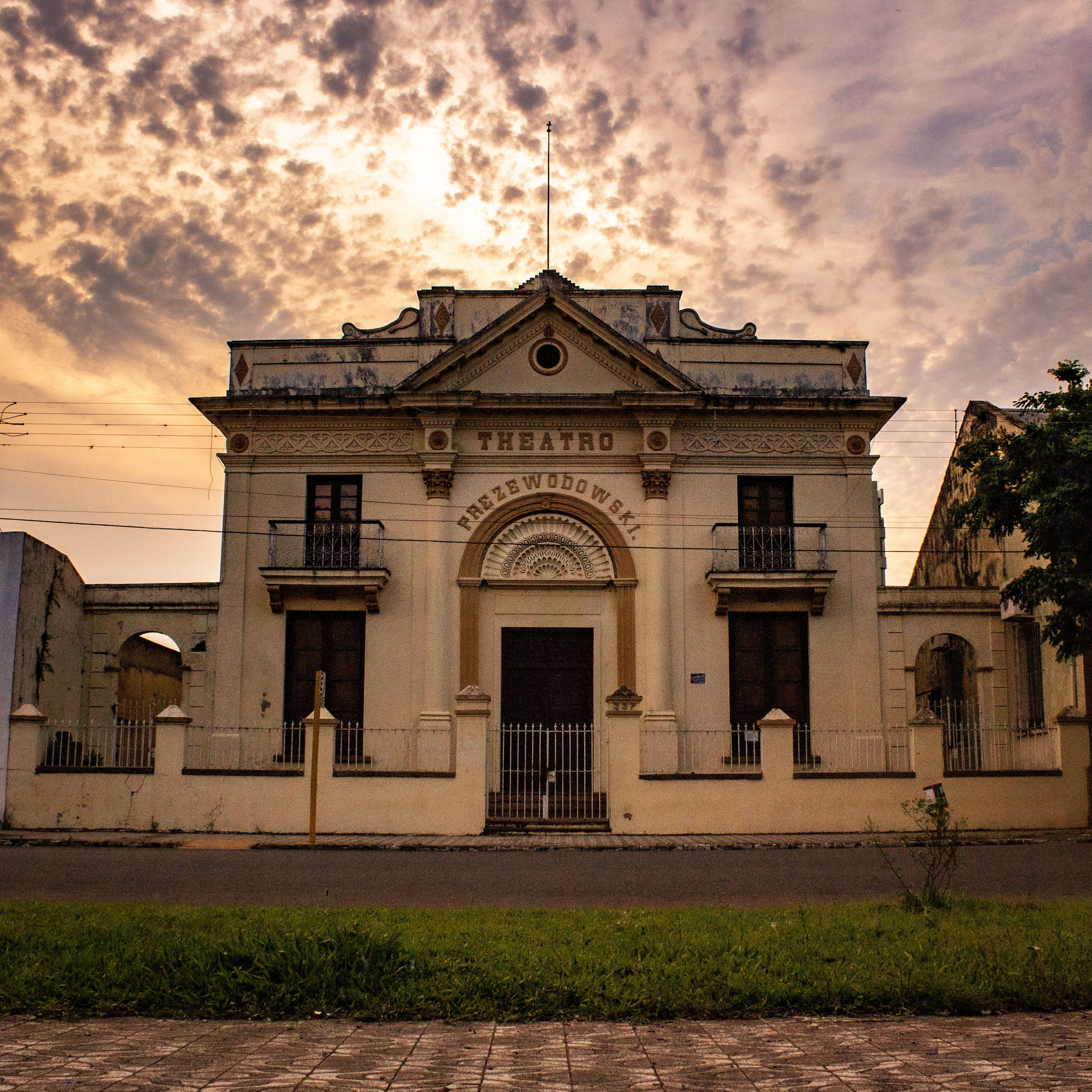 O Teatro Prezewodowski e o pôr do sol. Cultural propertyTeatro Prezewodowski, Itaqui, Rio Grande do Sul, Brazil Q3527536, P727: iPatrimônio ID: itaqui-teatro-prezewodowski